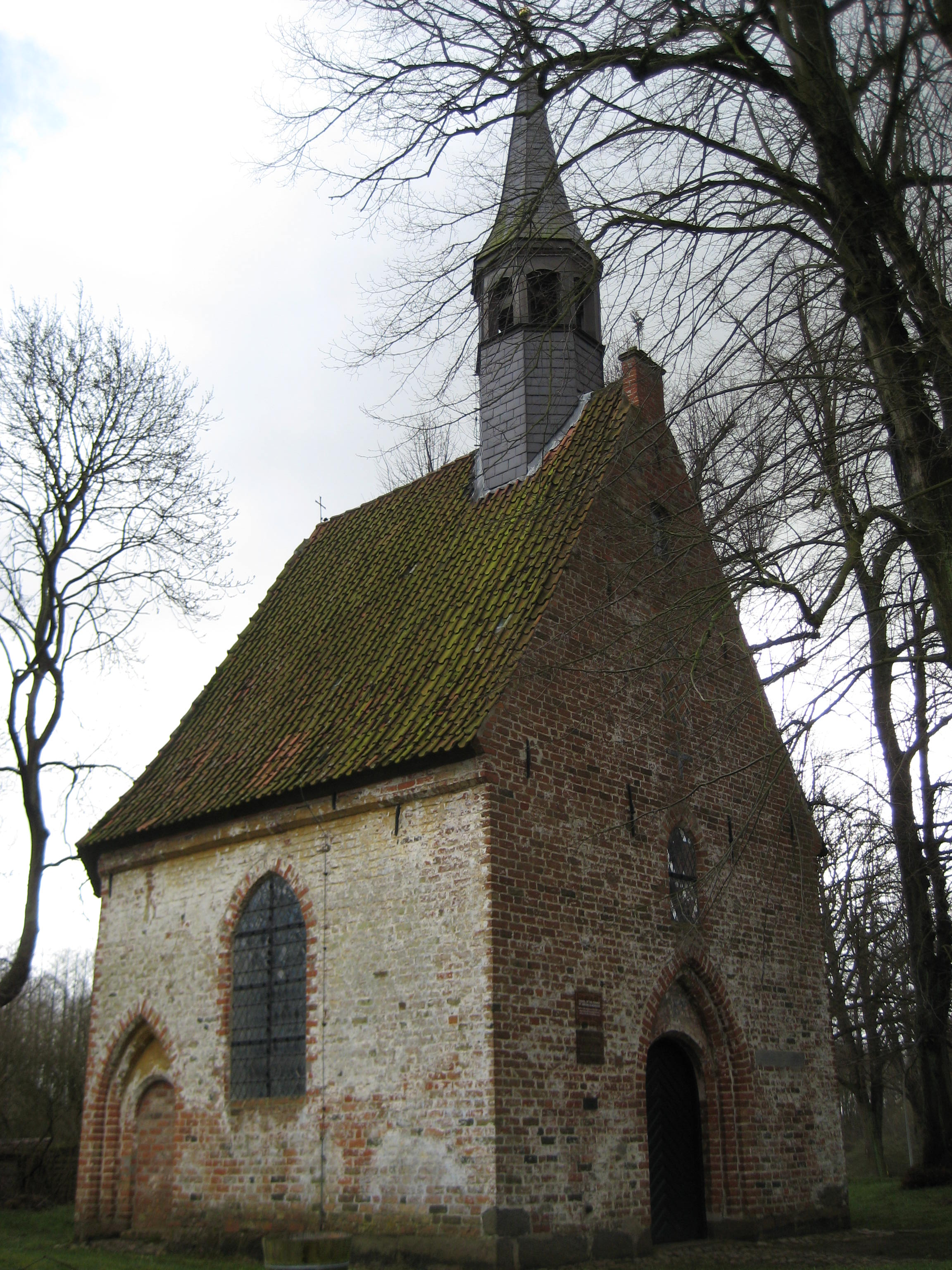 Siechenkapelle Klein-Grönau, gehört zu Lübeck, aber liegt räumlich in Groß Grönau